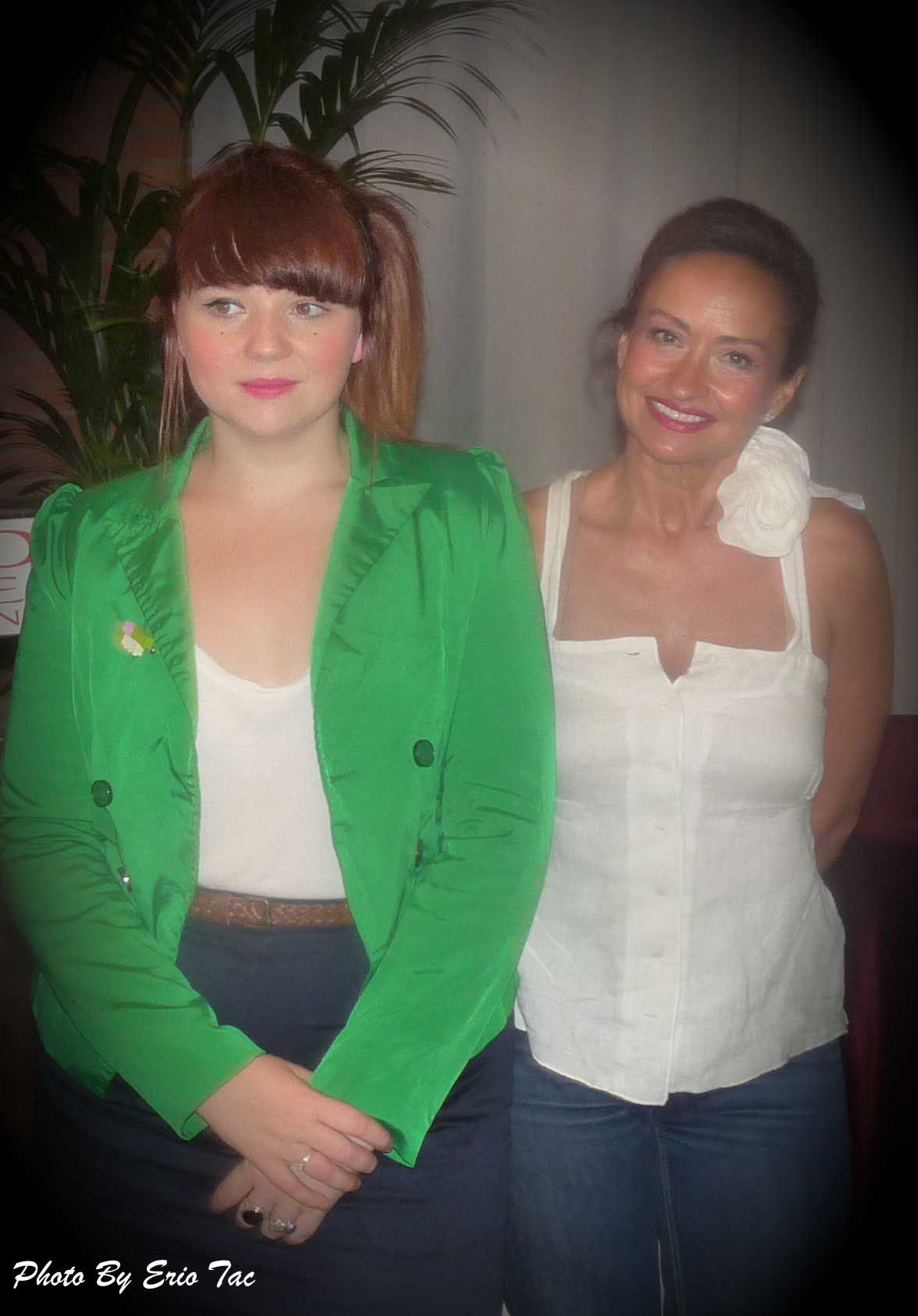 Luce et Marie Pierre Baux Présidente de l'association ' les Originales '